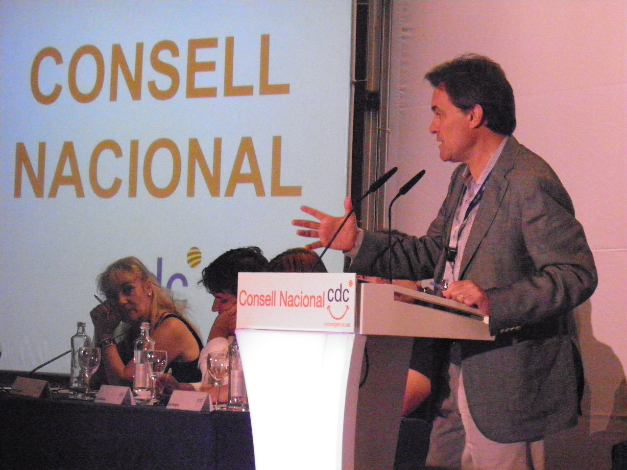 Mas al CN de CDC.